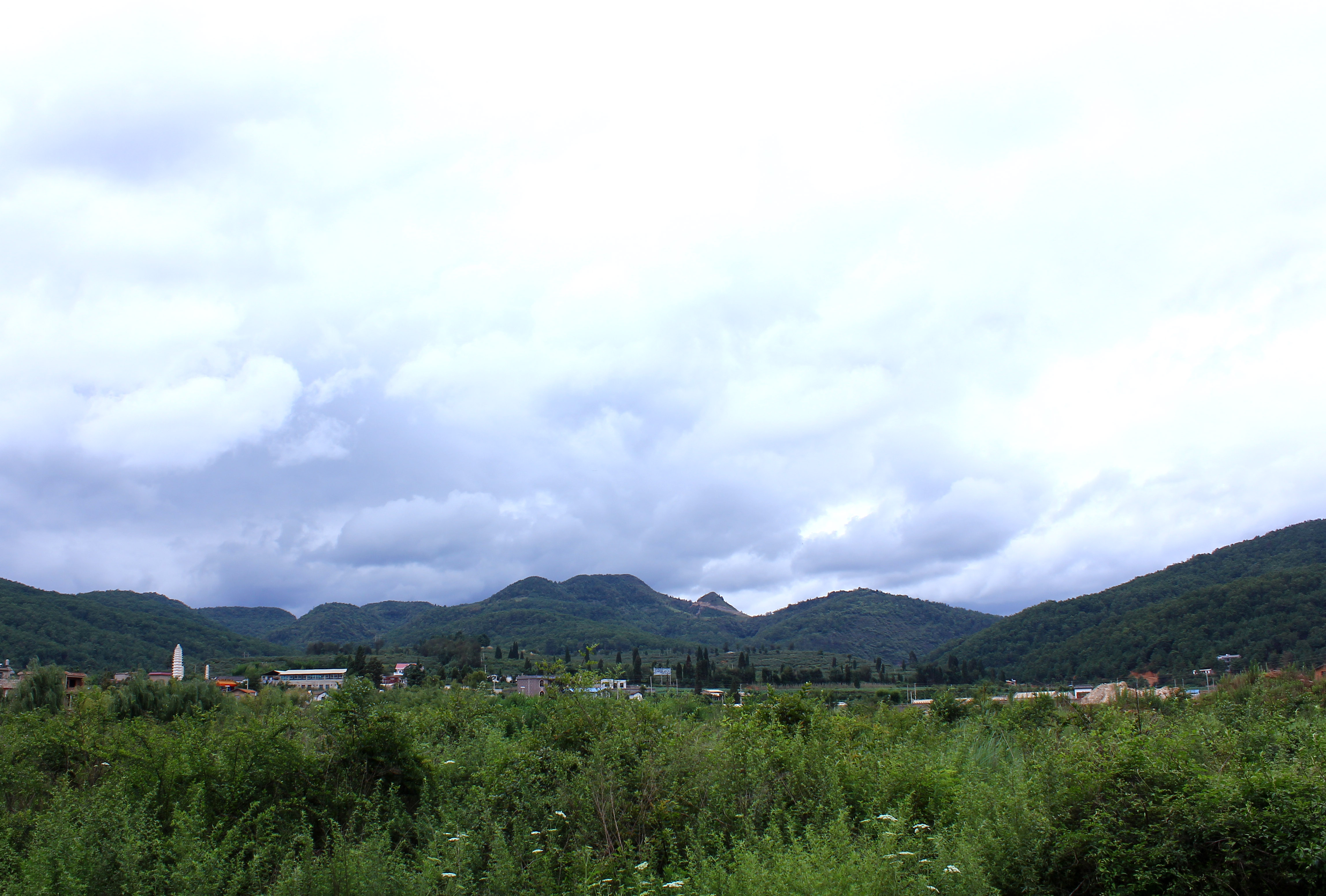 云南省昆明市西山区团结街道（原团结乡）卧云山